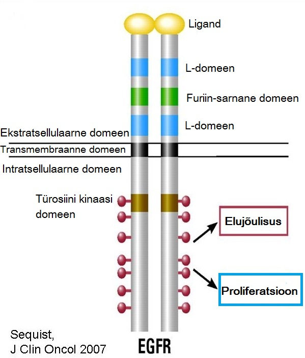 Epidermaalse kasvufaktori retseptor